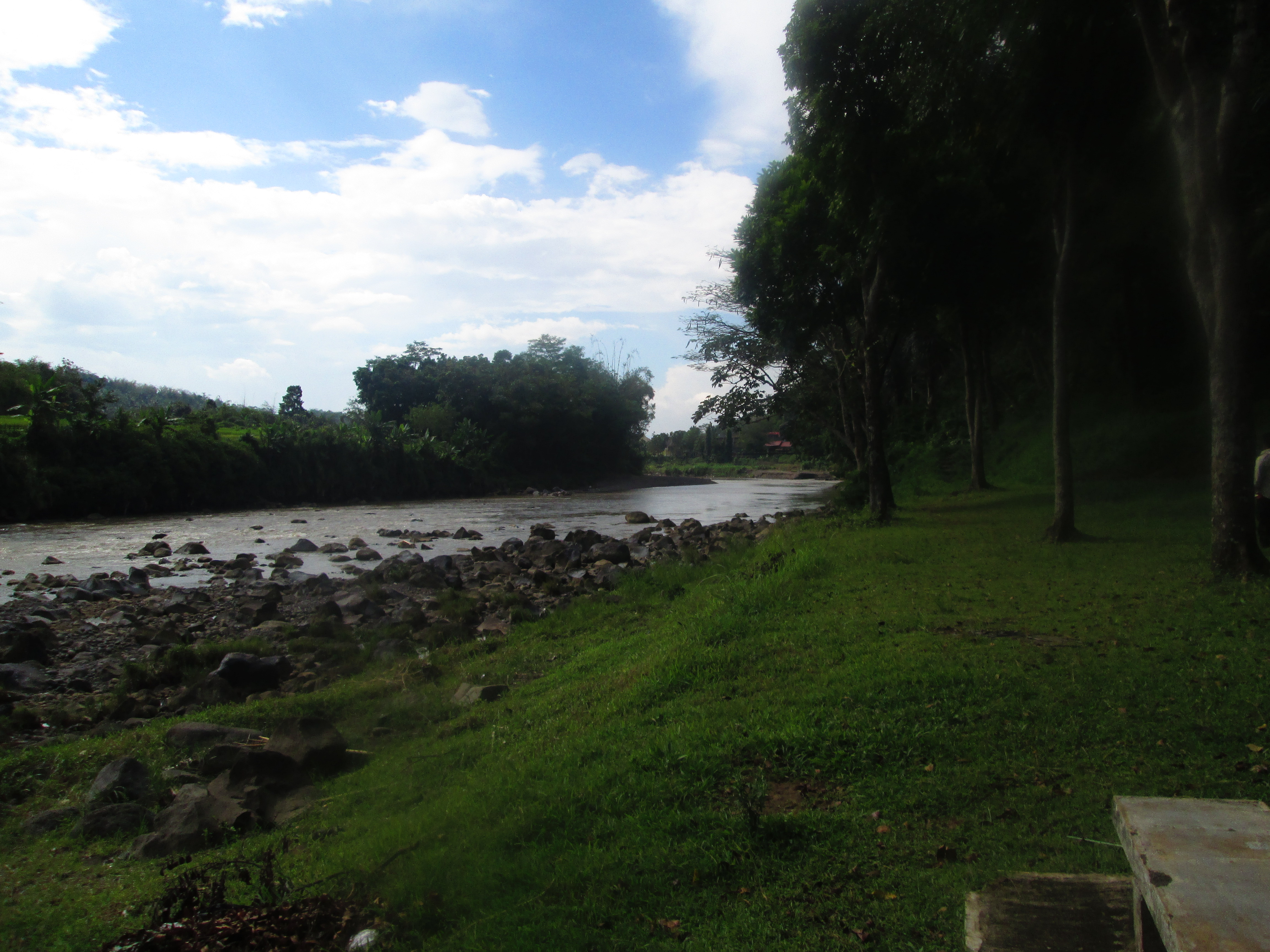 Sungai Progo di kawasan Taman Kyai Langgeng, Desa Kemirirejo, Kecamatan Magelang Tengah, Kota Magelang, Jawa Tengah.